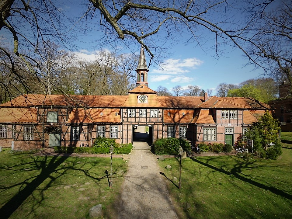 Schloßseite des Wellingsbüttler Torhauses. Im rechten Flügel das Alstertalmuseum